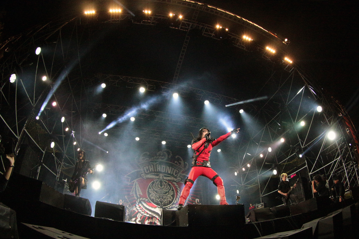 閃靈2016大港開唱演唱會